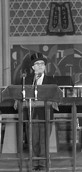 Sally Kessler (1912-1985), deutscher Kommunalpolitiker und Mitglied des Vorstandes der Synagogengemeinde Köln